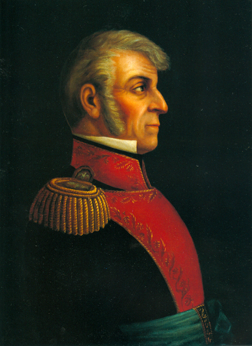 Retrato de Ignacio López Rayón (1773-1832)